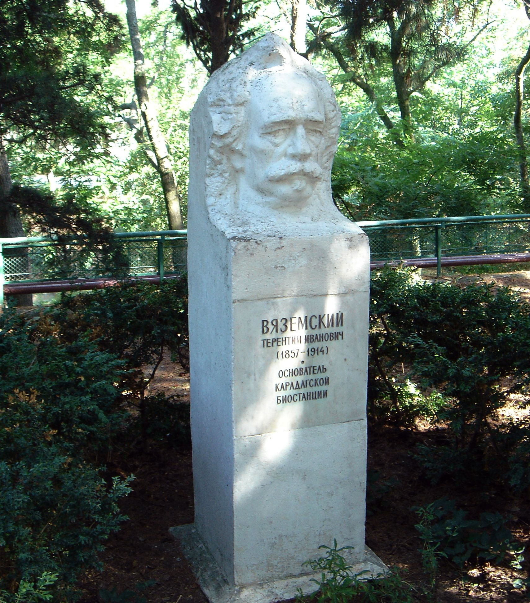 российский учёный Т.И. Вяземский